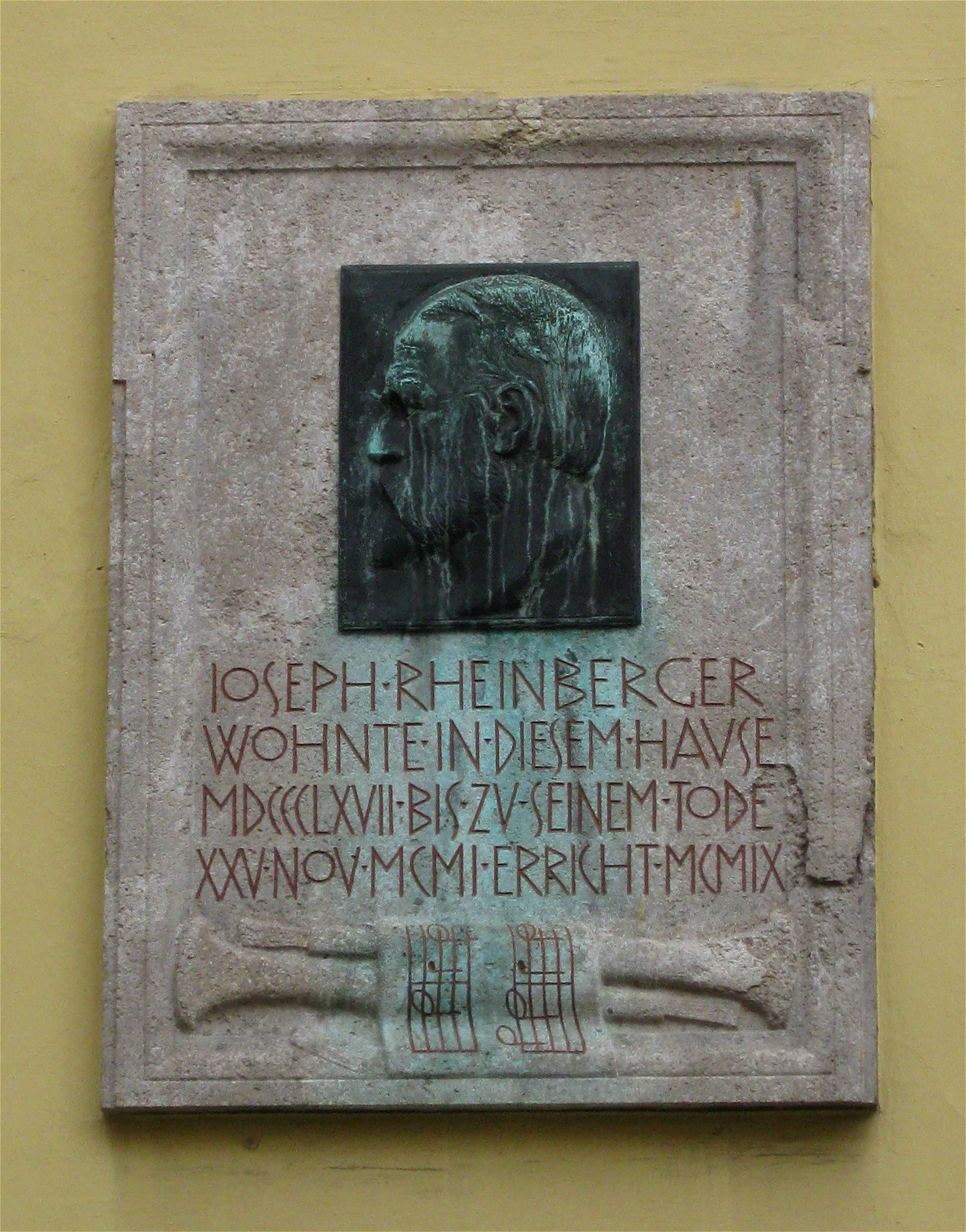 Gedenktafel Fürstenstraße 6; 1867-1901 Wohnhaus des Komponisten Joseph Rheinberger